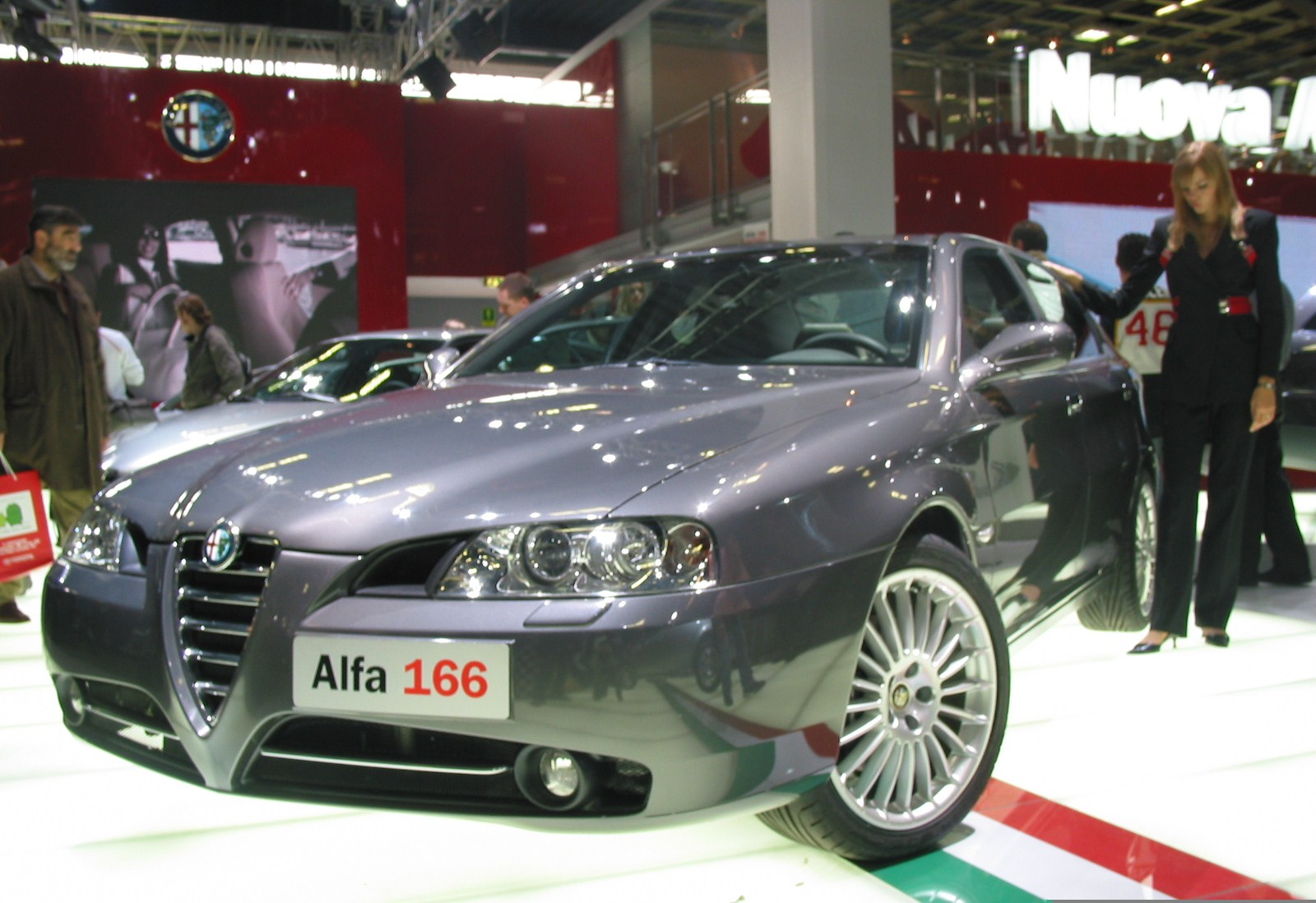 Eugenio Campagnoli, Foto Alfa Romeo 166 scattata al Motor Show di Bologna nel 2004